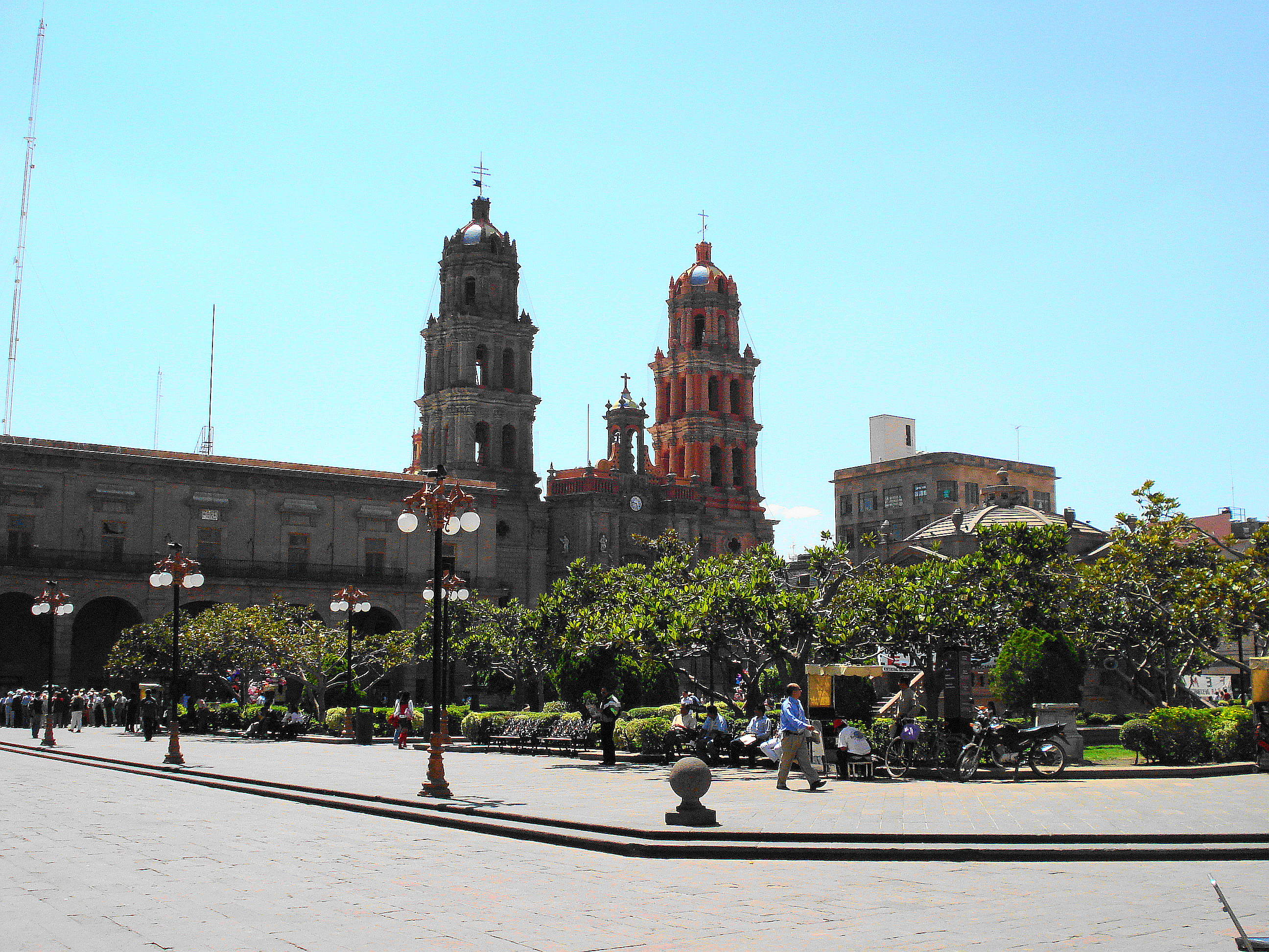 Plaza de Armas en San Luis Potosi, Mexico.